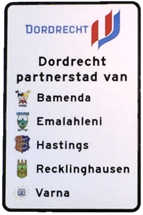 Dordrechts partnersteden